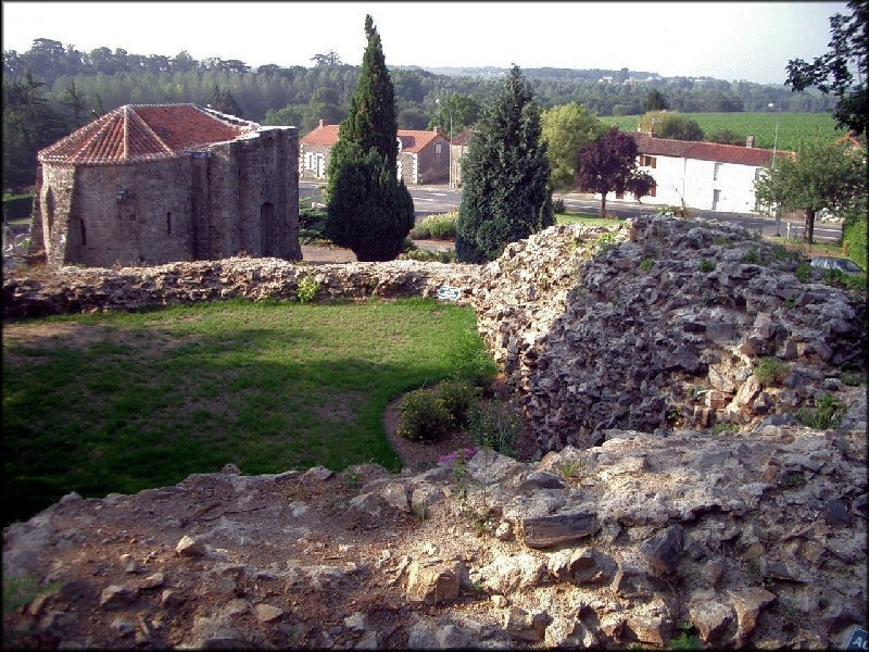 Ancien donjon et chapelle Sainte-Anne, le Pallet, Loire-Atlantique, France.